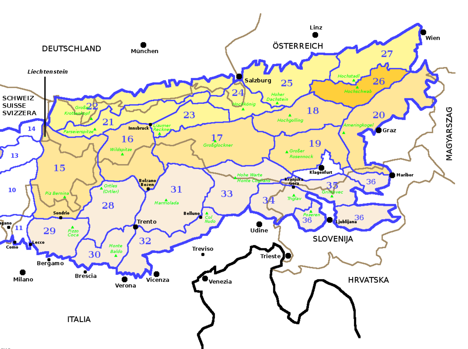 Alpi Orientali secondo la SOIUSA con evidenziate le Alpi Settentrionali di Stiria